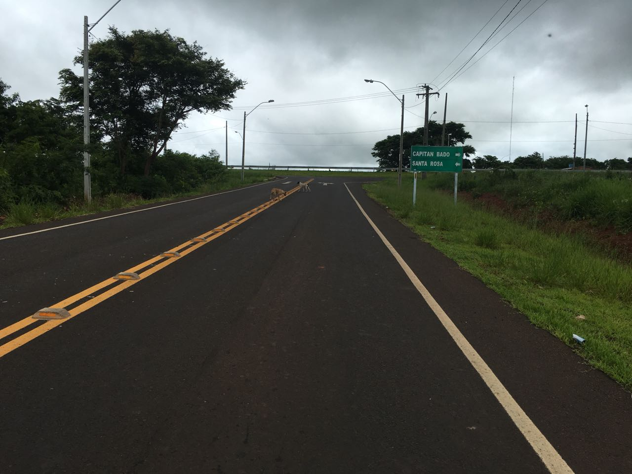 Acceso a karapai